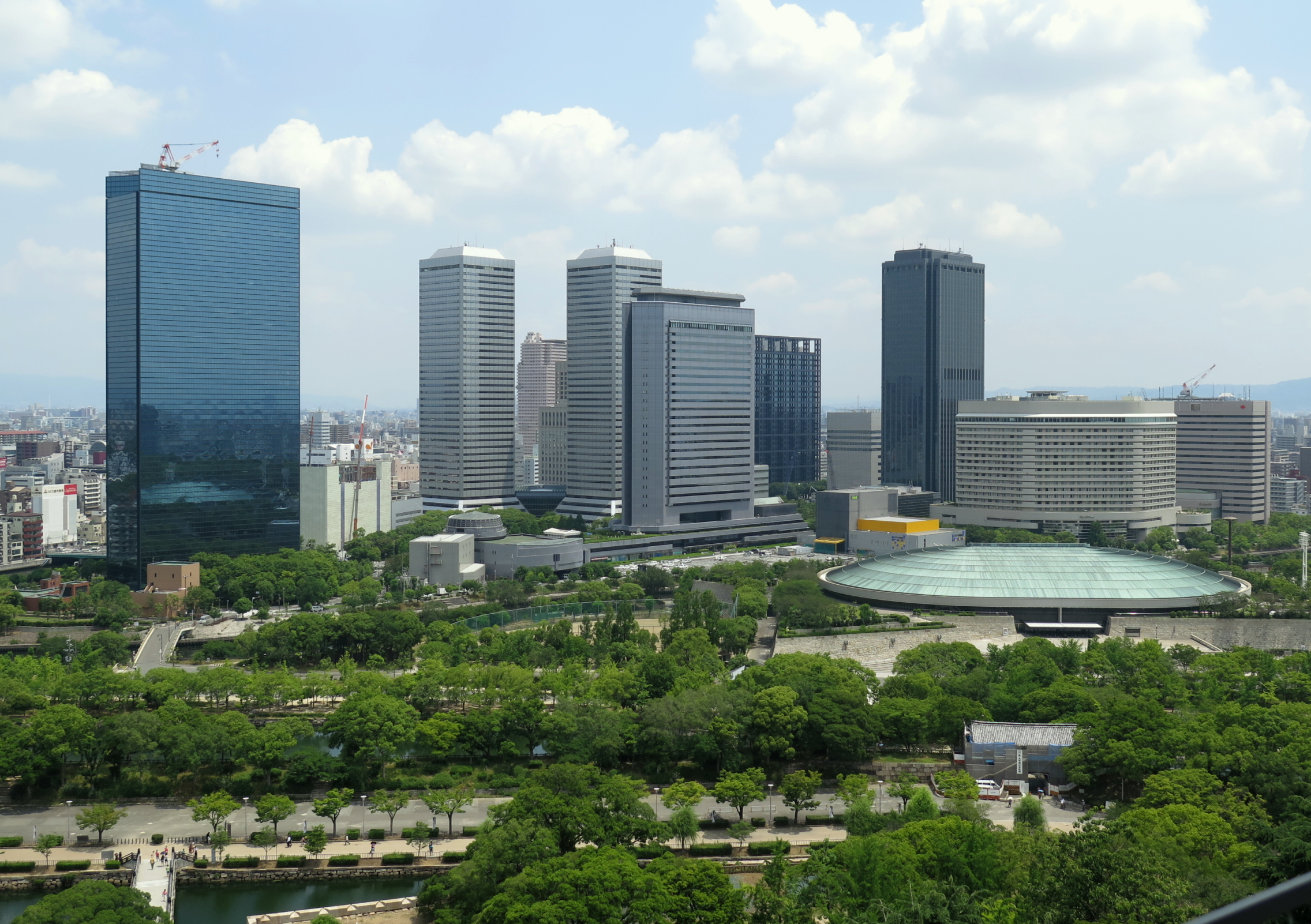 Osaka Business Park